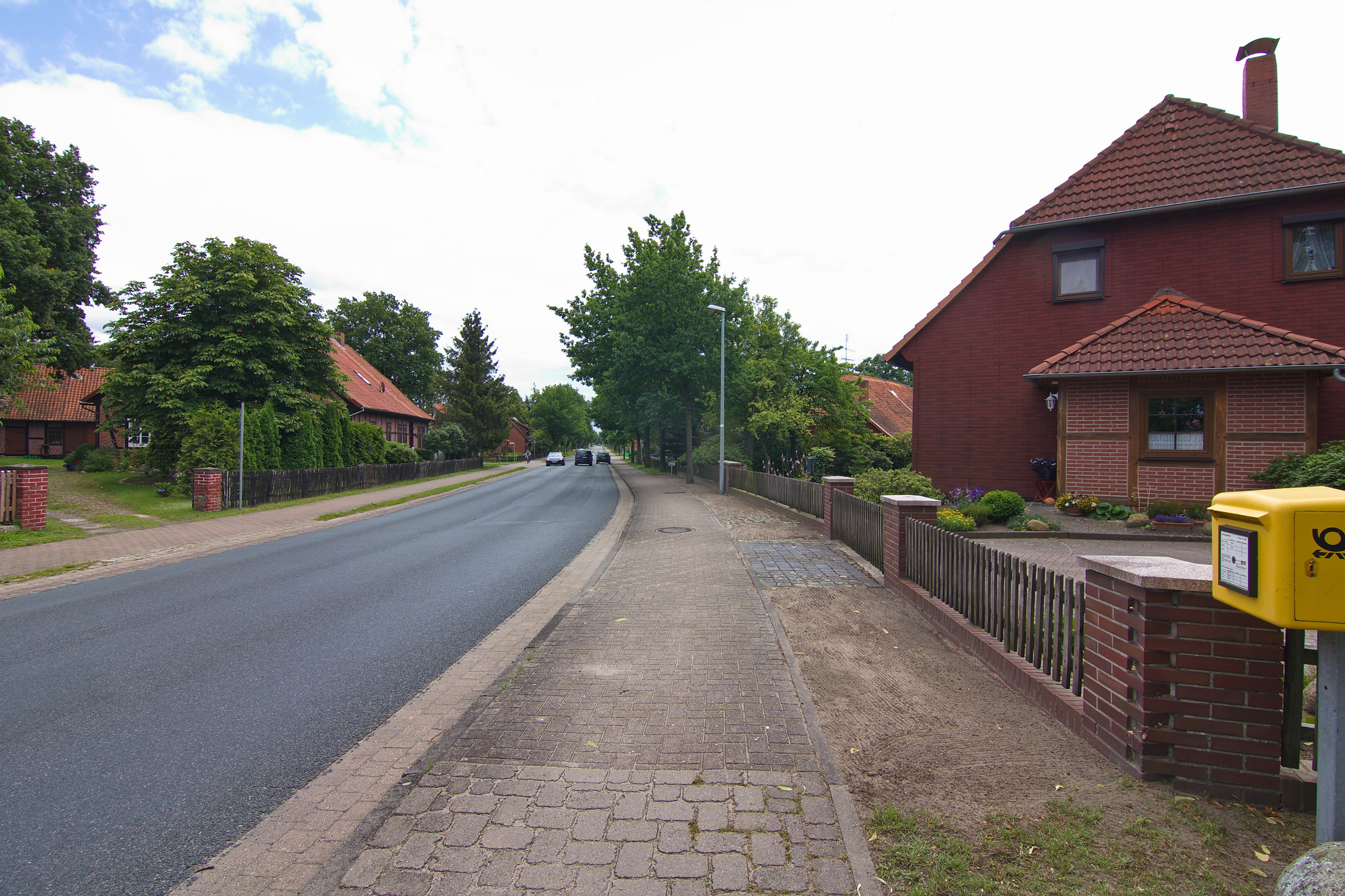 Ortsblick in Hademstorf, Niedersachsen, Deutschland